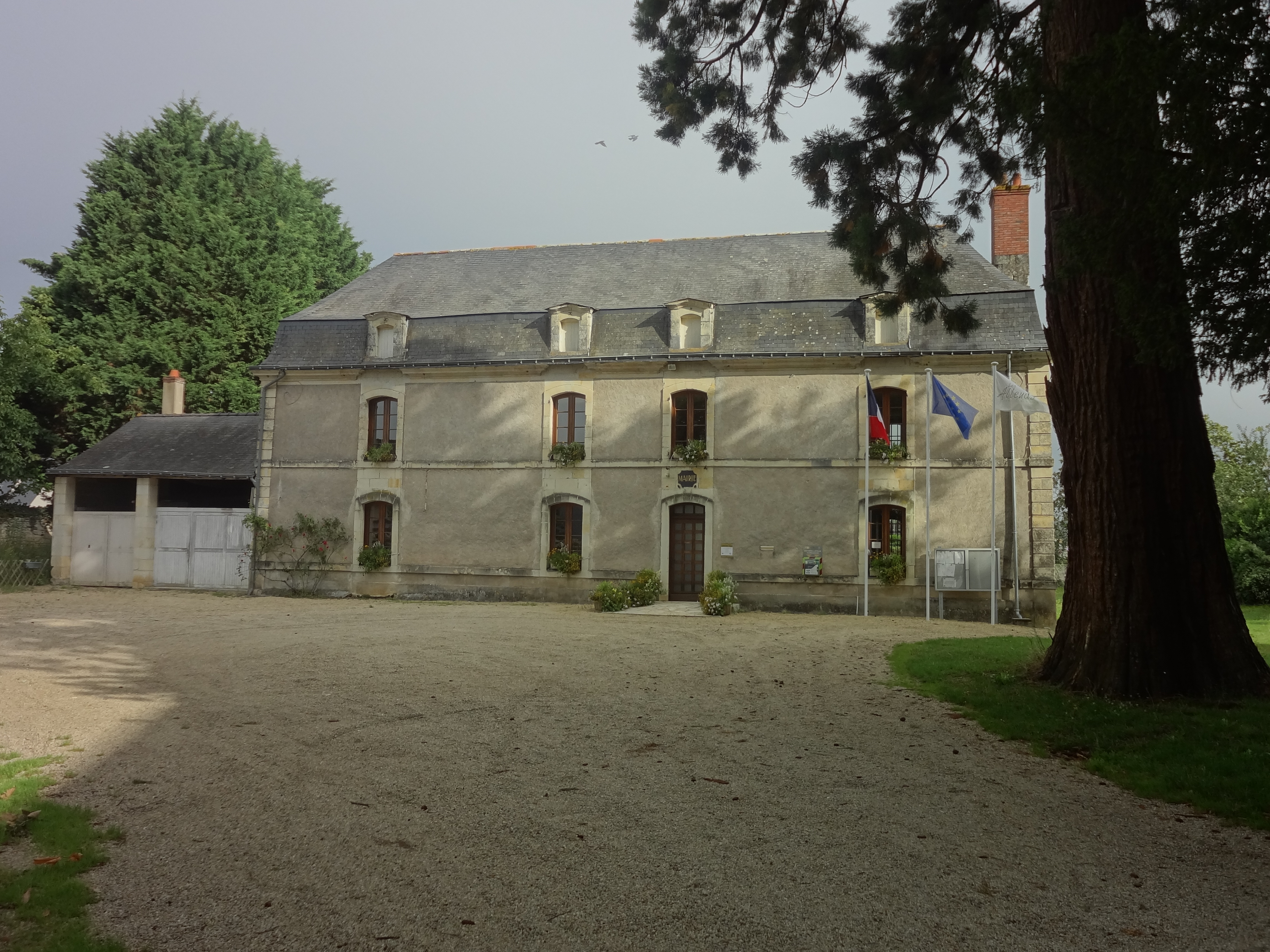 Mairie des Alleuds (Maine-et-Loire, France).